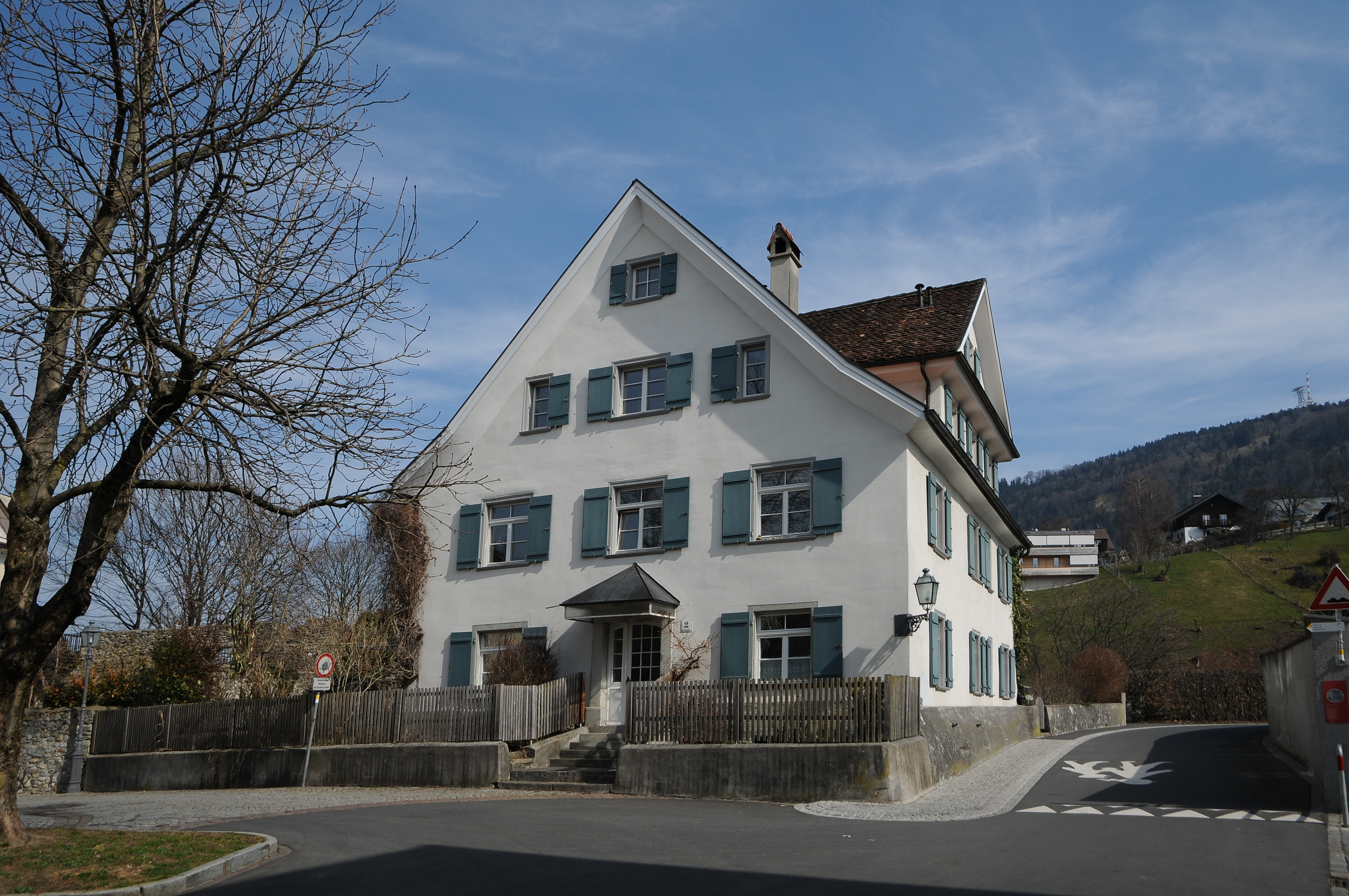 Amtsplatz Nr.:2 in der Oberstadt von Bregenz, Vorarlberg.